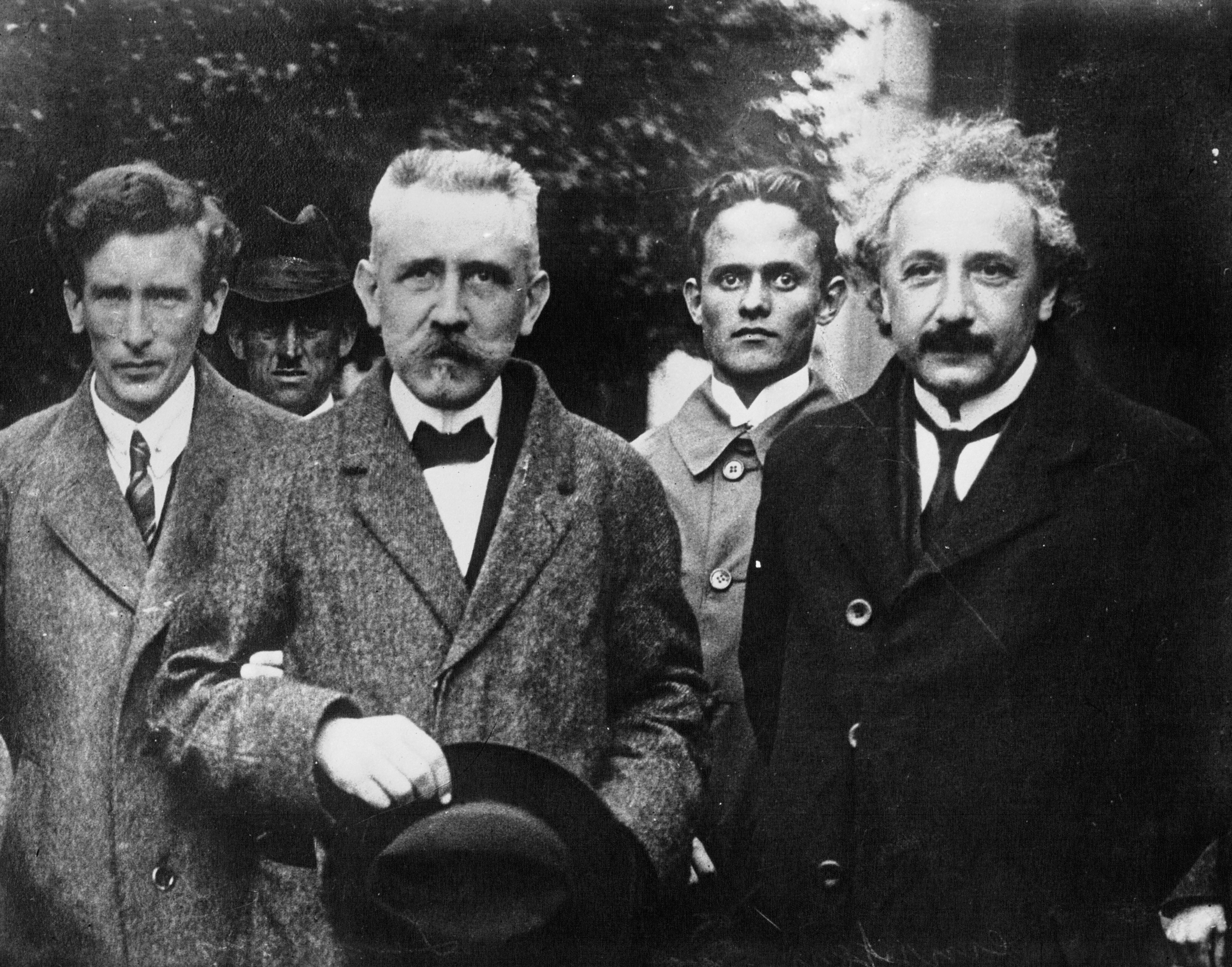 De droite à gauche : Einstein, Professeur Langevin et R. Smith : [photographie de presse] / Agence Meurisse